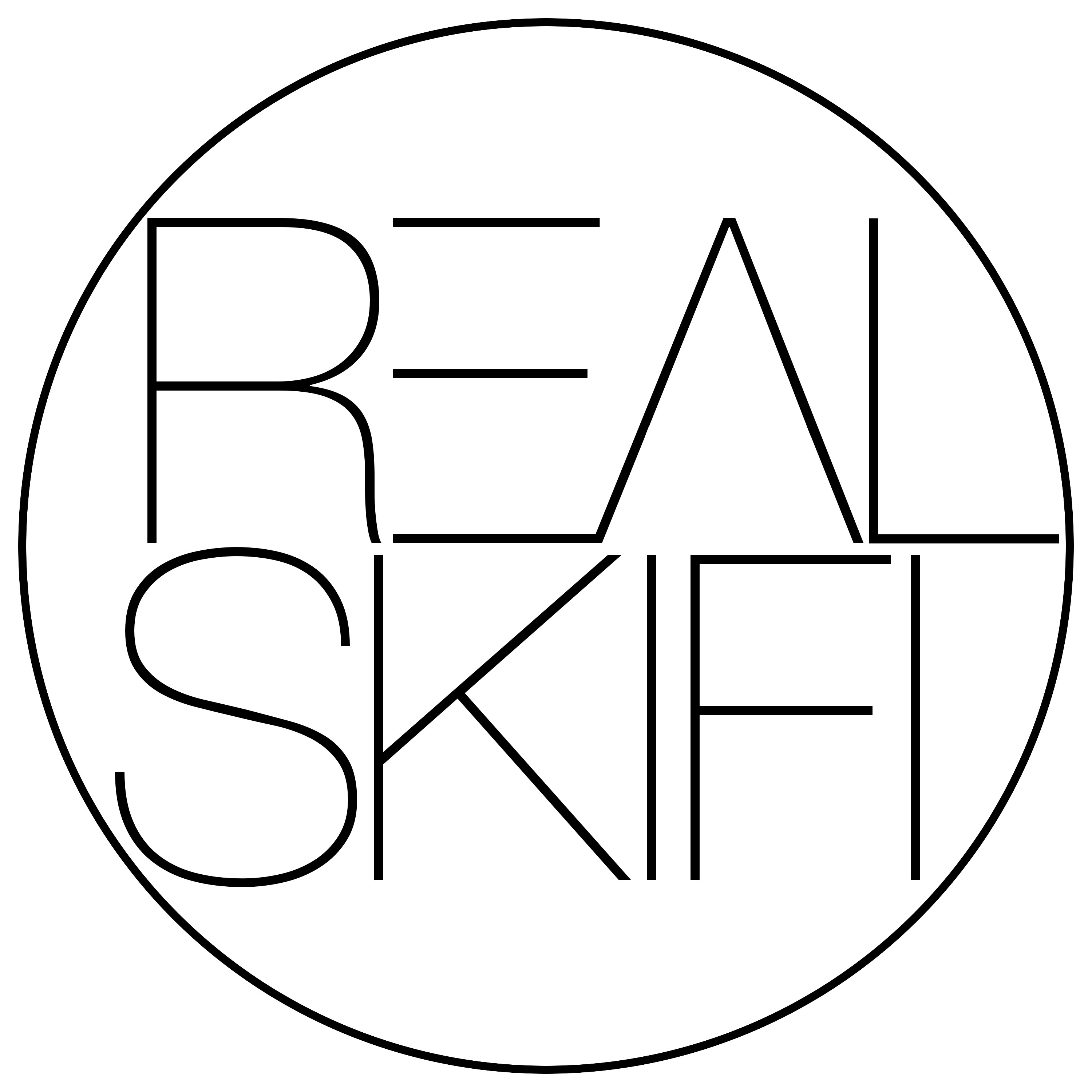 Real Skifin logo